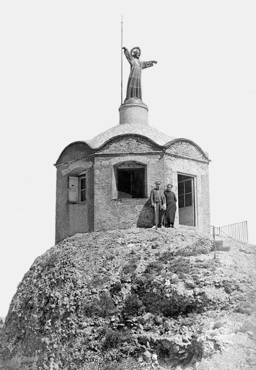 Grup de persones al mirador del cim de Sant Jeroni. Enric Ribas i Virgili (Entre 1920 i 1930) This is a a photo of an emblematic summit in Catalonia, Spain, with id: CE-280115006